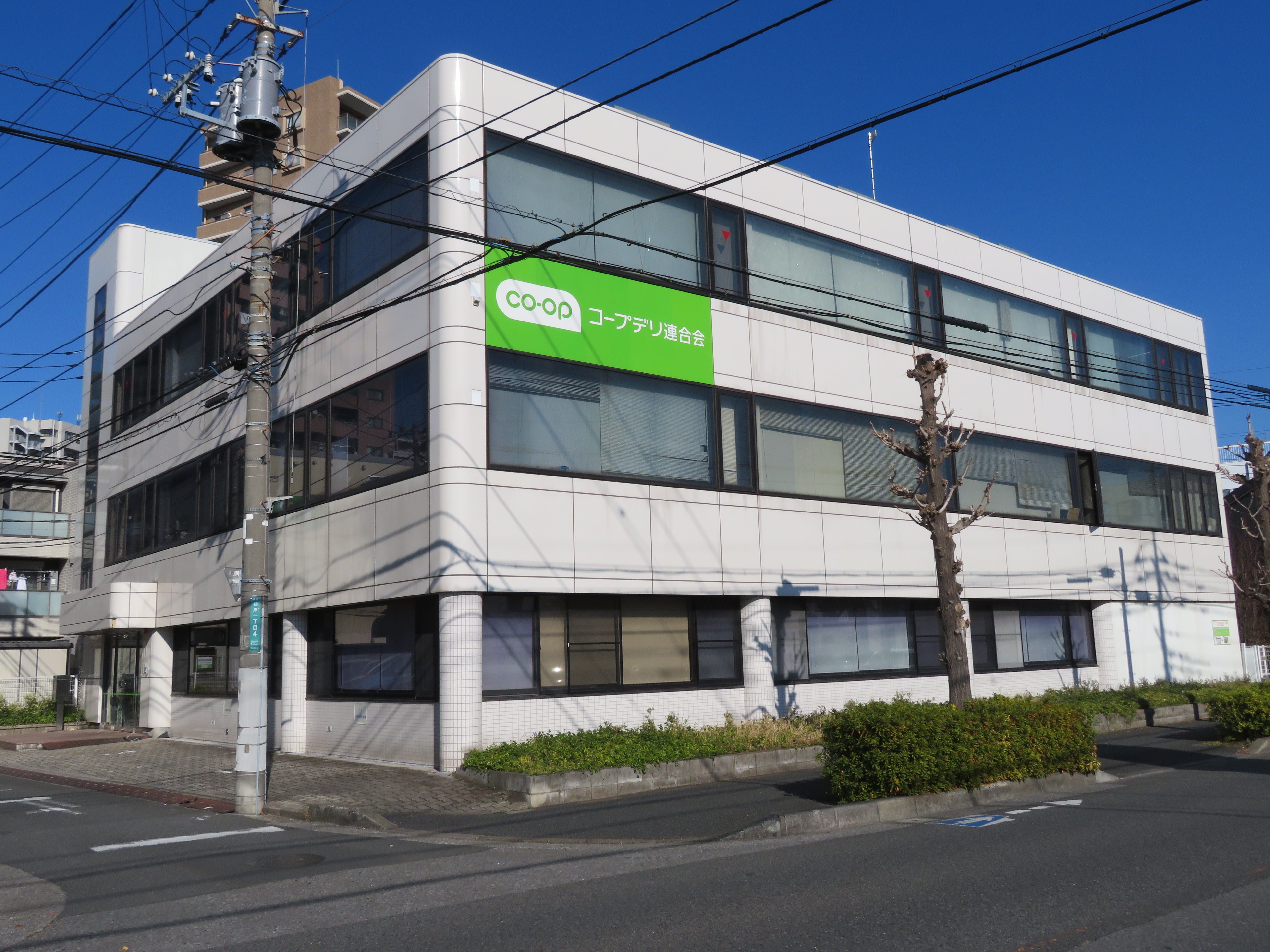 さいたま市南区に所在するコープデリ生活協同組合連合会 本館 Canon PowerShot SX720 HS